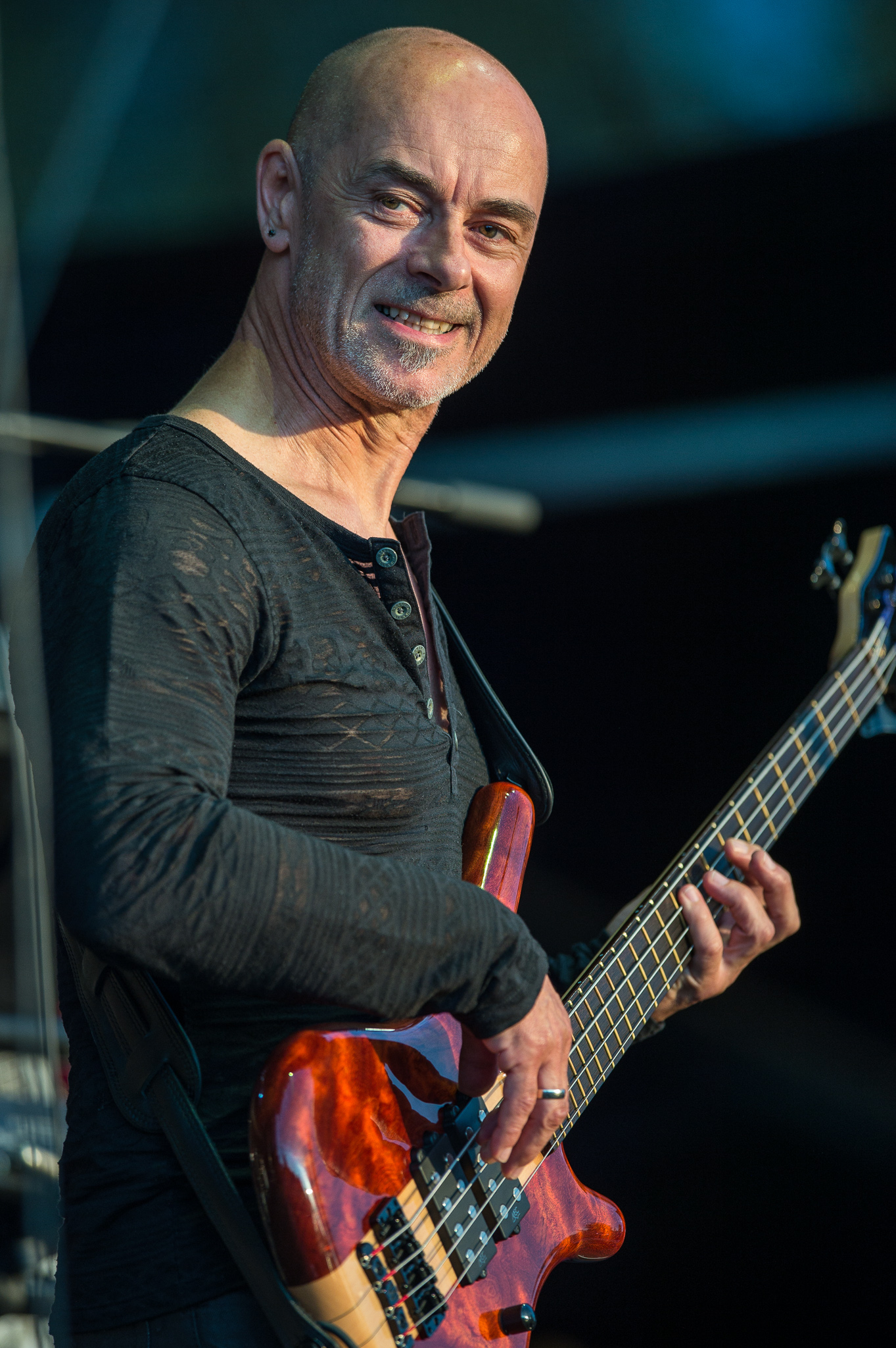 Brombachsee,Concertbüro Franken,Festival,Konzert,Lieder am See,Livekonzert,Livemusik,Manfred Mann’s Earth Band,Musik,Steve Kinch